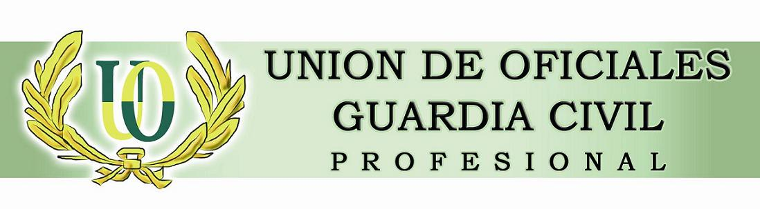 Logo UO